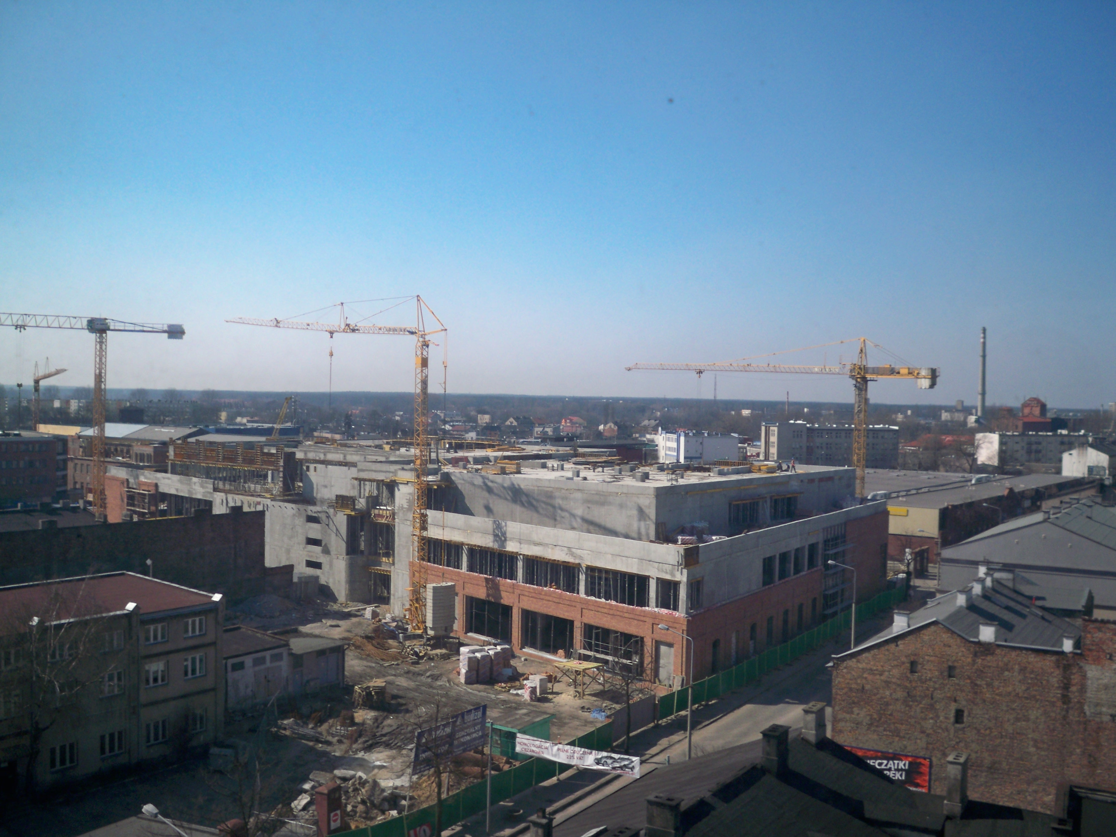 Budowa Wzorcowni Włocławek (2009 r.)